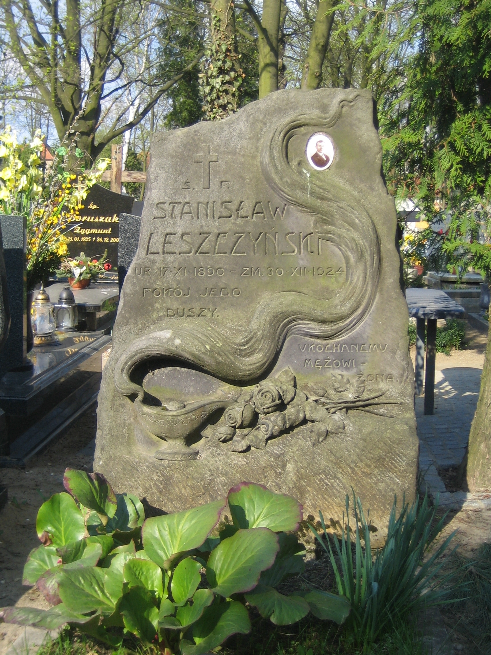 Nagrobek Stanisława Leszczyńskiego na cmentarzu na Jeżycach